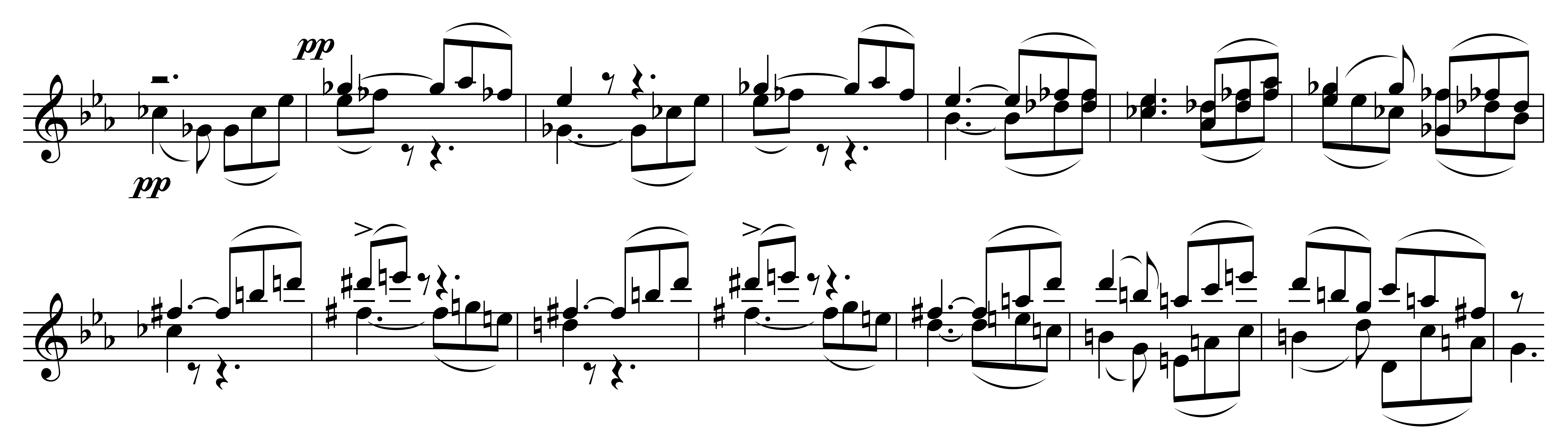 Notenbeispiel Schubert Sinfonie 5 - 2.Satz Seitenthema T. 27-41